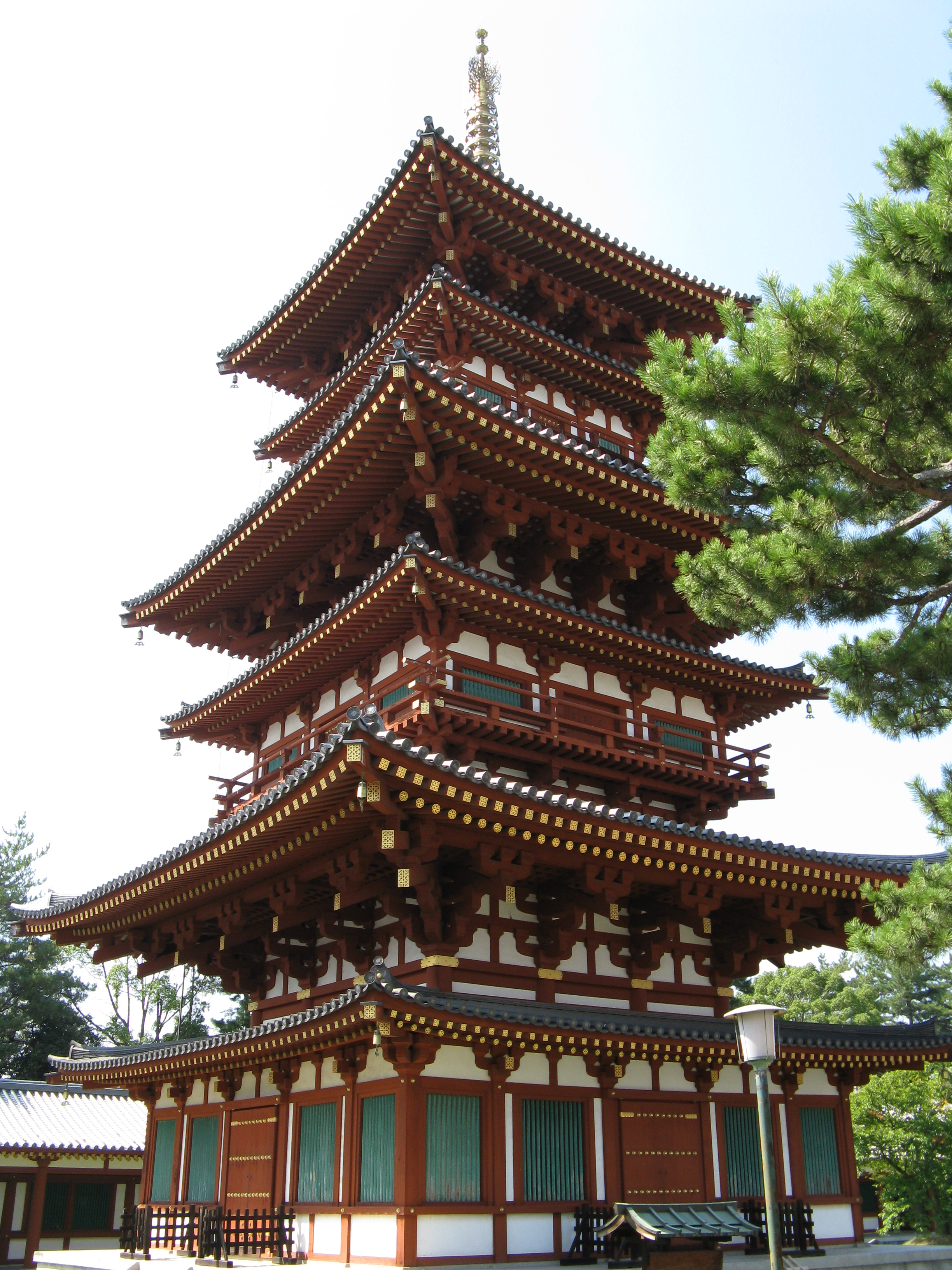 薬師寺 西塔